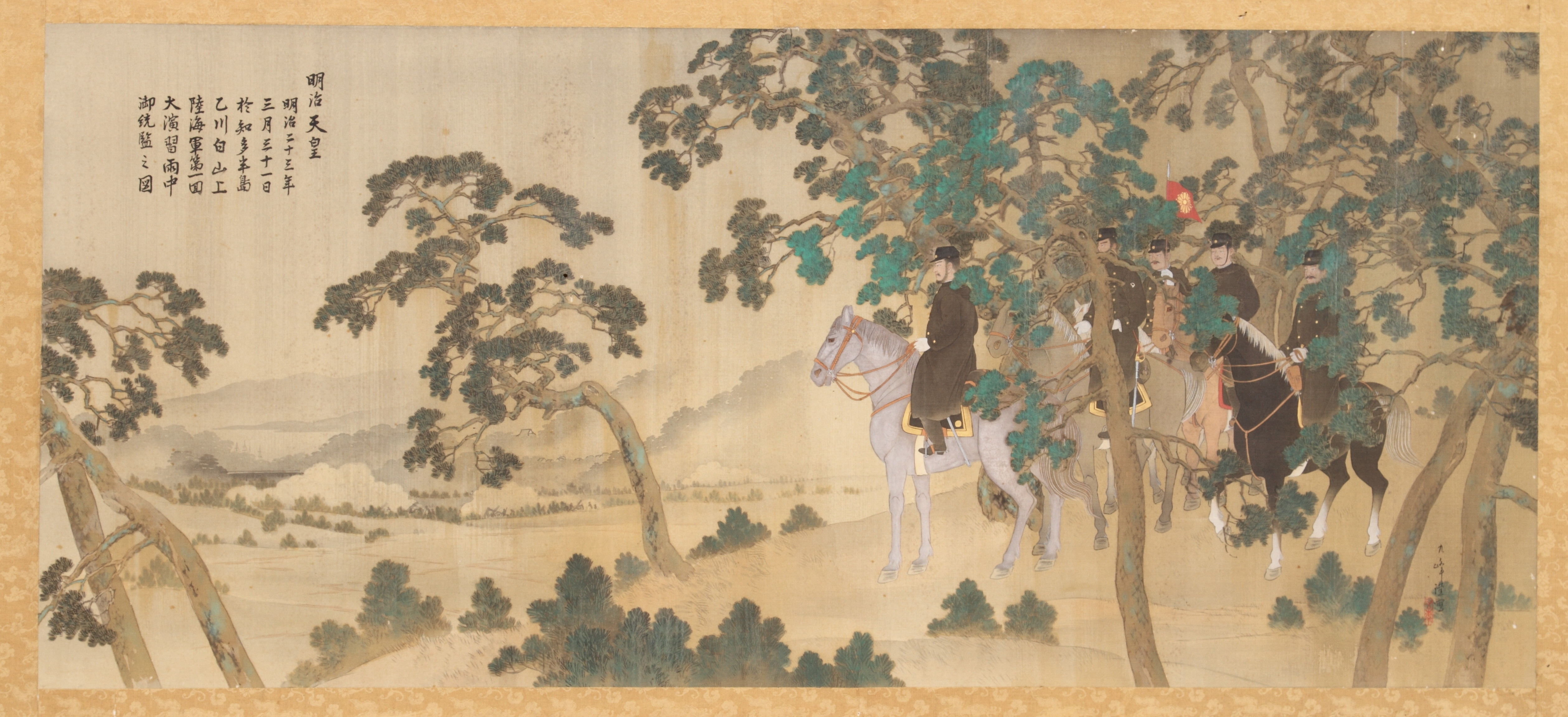 愛知県半田市の乙川八幡社にて保存用用資料として撮影した石井九峯『統監図九峯画』。